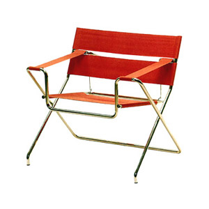 Faltbarer, mit Eisengarngurten bespannter Stahlrohrsessel, entworfen von Marcel Breuer und Margaretha Reichardt 1927, Reedition TECTA